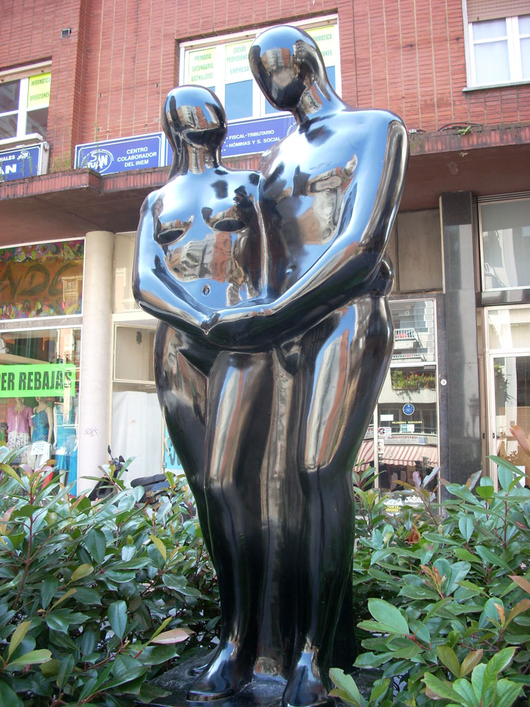 Autor.- Santiago de Santiago, 1993. Plaza de Juan XXIII. Oviedo